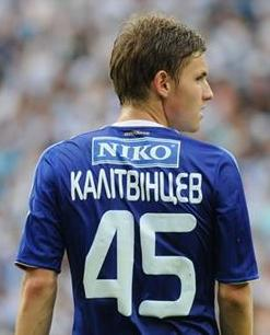 Владислав Калитвинцев - український футболіст під час виступів за Динамо (Київ)